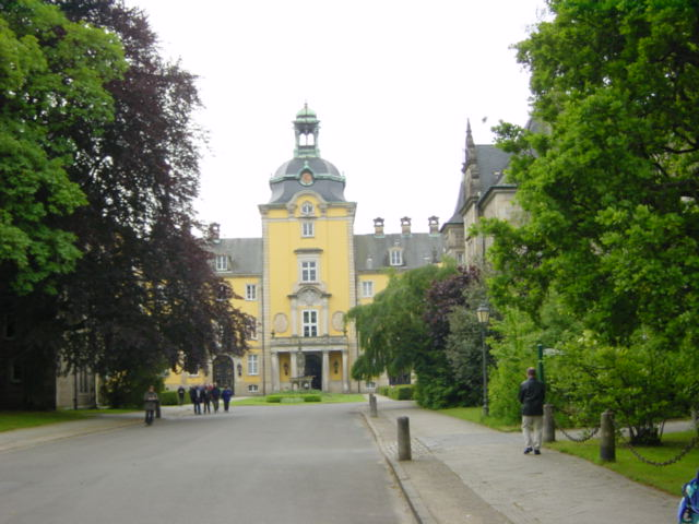 Schloß Bückeburg